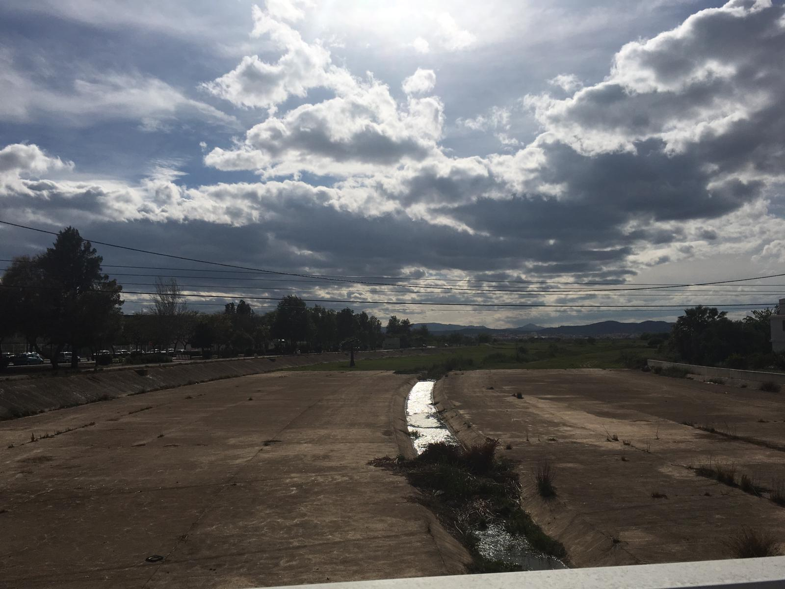 Barranc del Tramusser